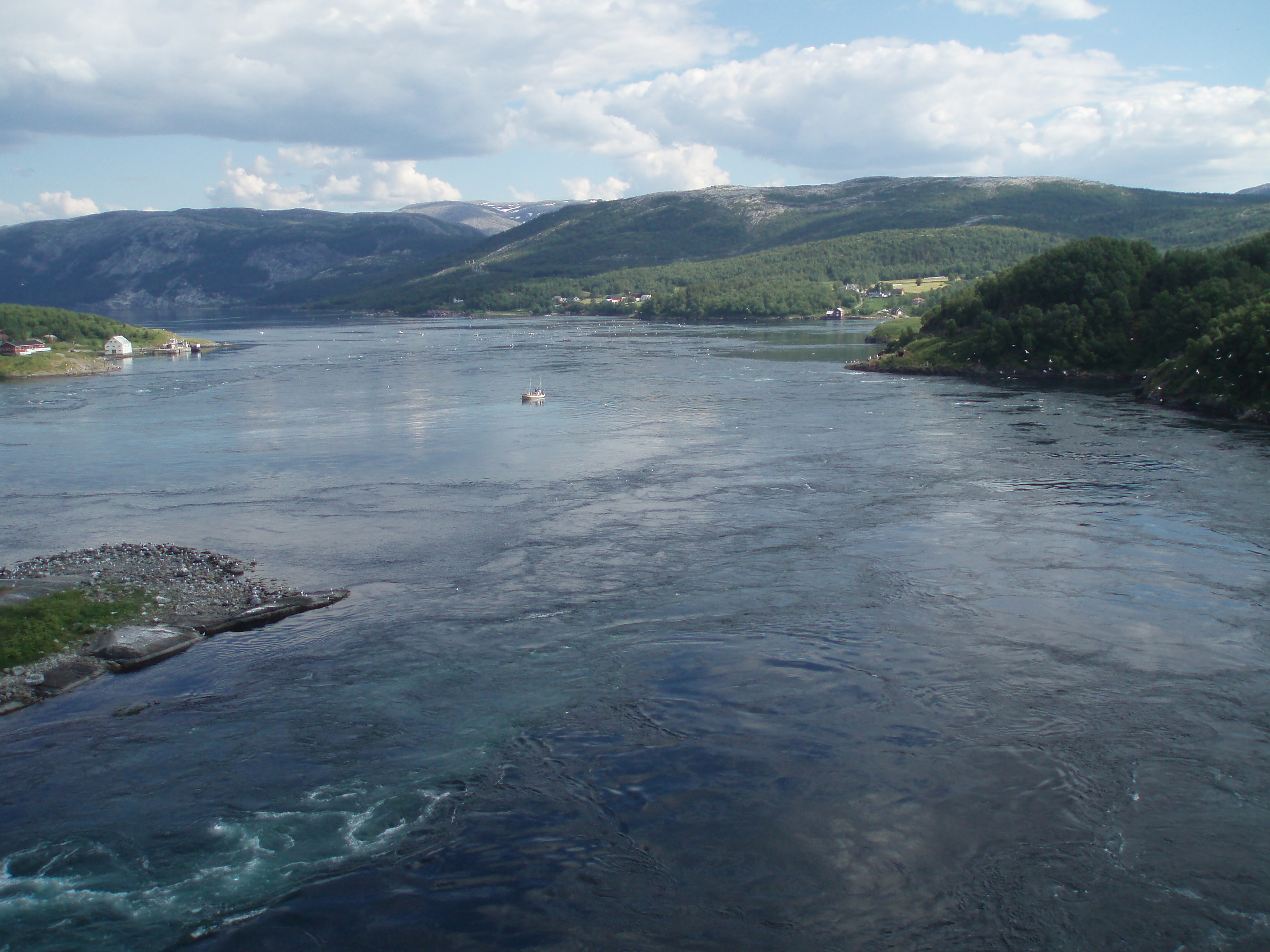 Svefjorden seen from Saltstraumen